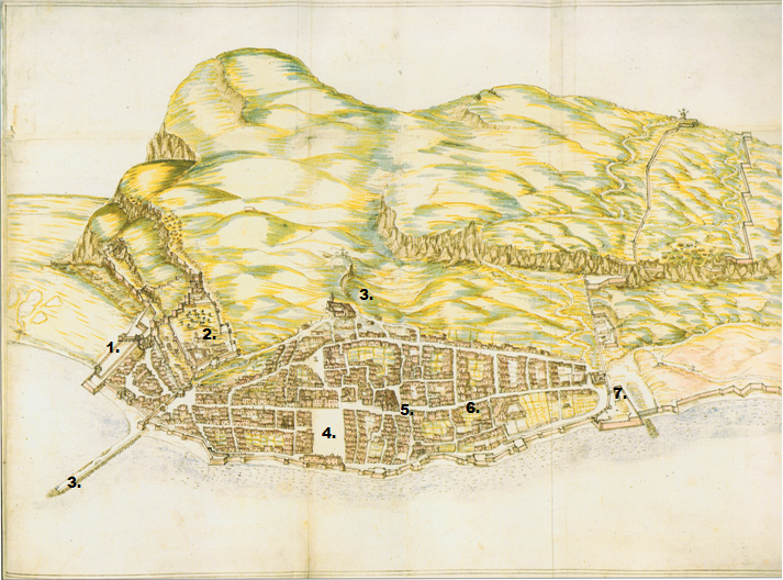 La trama urbana de Gibraltar en 1627, tal como la describió Luis Bravo de Acuña en 1627 en su obra Gibraltar fortificada: por mando de el Rey nuestro señor D. Philippe IIIº. Consejo, y cuidado de D. Gaspar de Guzman Conde de Olivares, Duque de Sanlucar. Museo Británico, manuscrito B. M. Mss Add. 15.152: 1- Puerta de España 2- Castillo 3- Hospital de San Juan de Dios 4- Plaza Mayor 5- Iglesia parroquial de Santa María la Coronada y San Bernardo 6- Calle Real 7- Puerta de África 8- Muelle Viejo